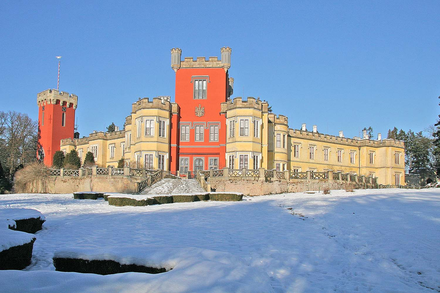 zámek Hrádek u Nechanic, district Hradec Králové autor: Prazak date: 9. 1. 2006